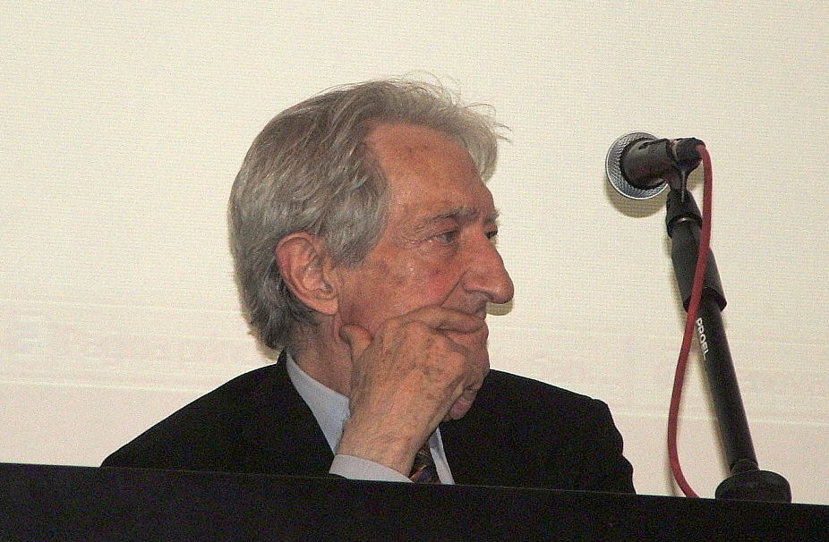 Edoardo Sanguineti, ritaglio di Image:Genova-Edoardo Sanguineti-DSCF7784.JPG